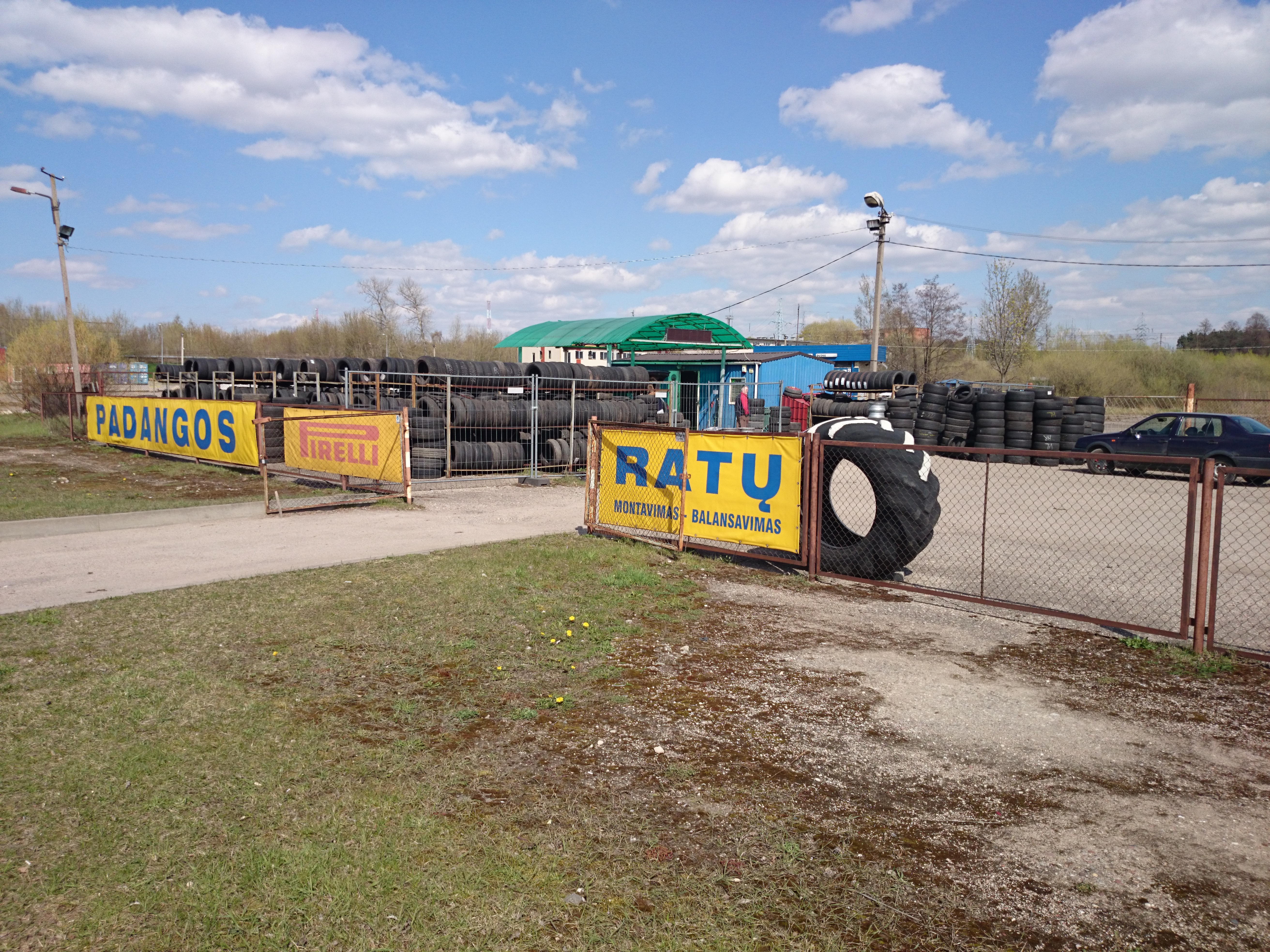 Jonava